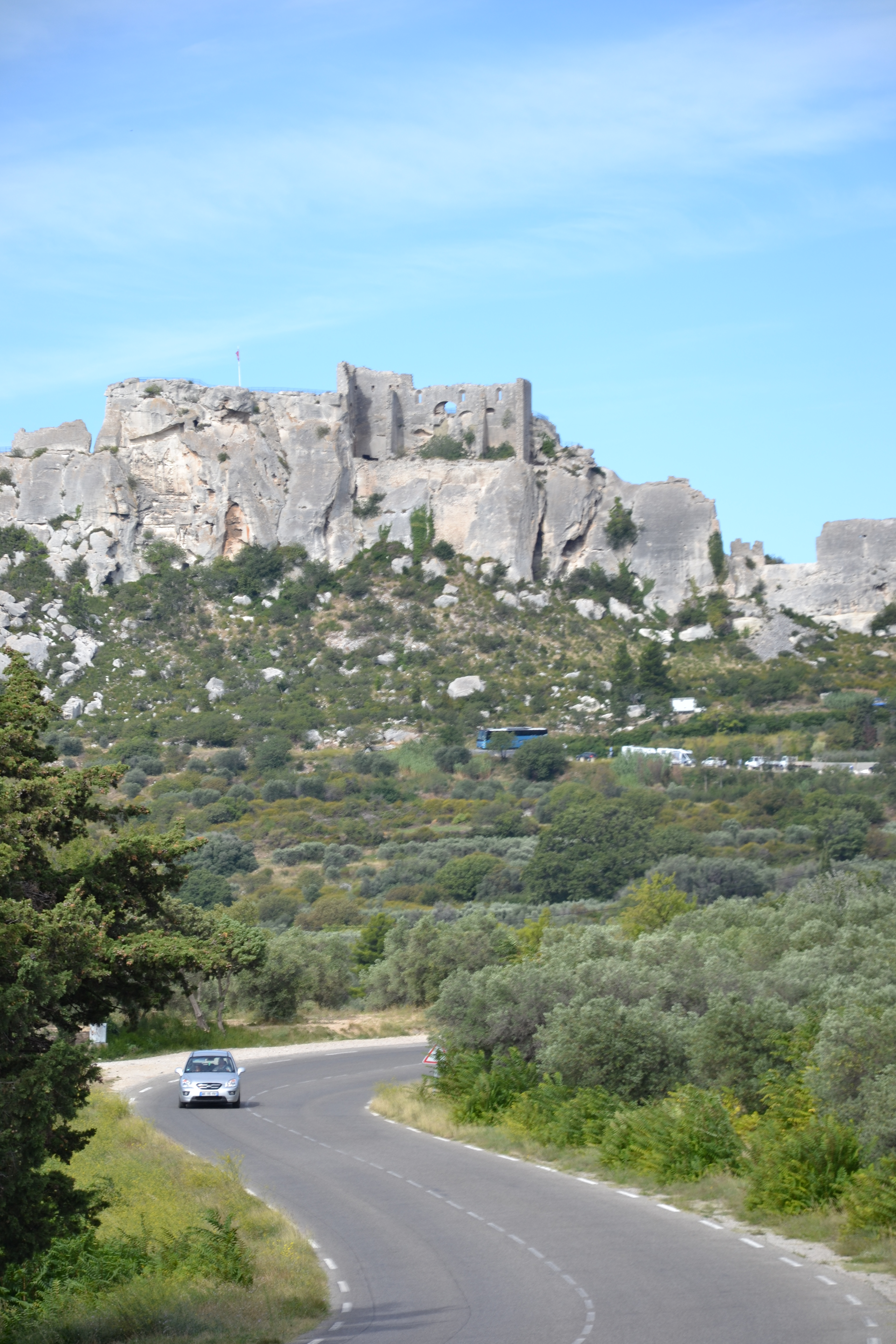 Château (Classé) .